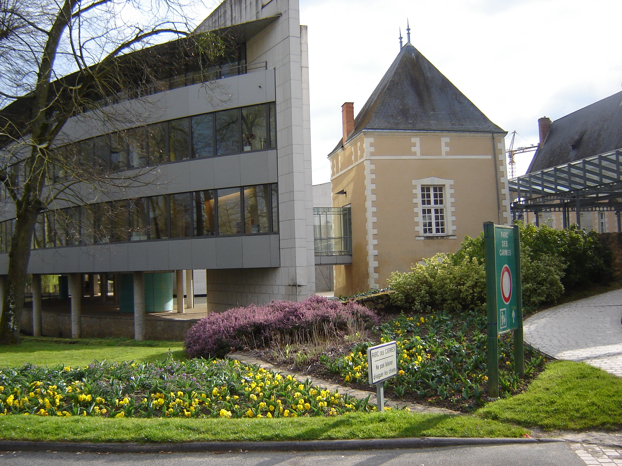 Vue mairie de La Flèche, France, Parc des Carmes